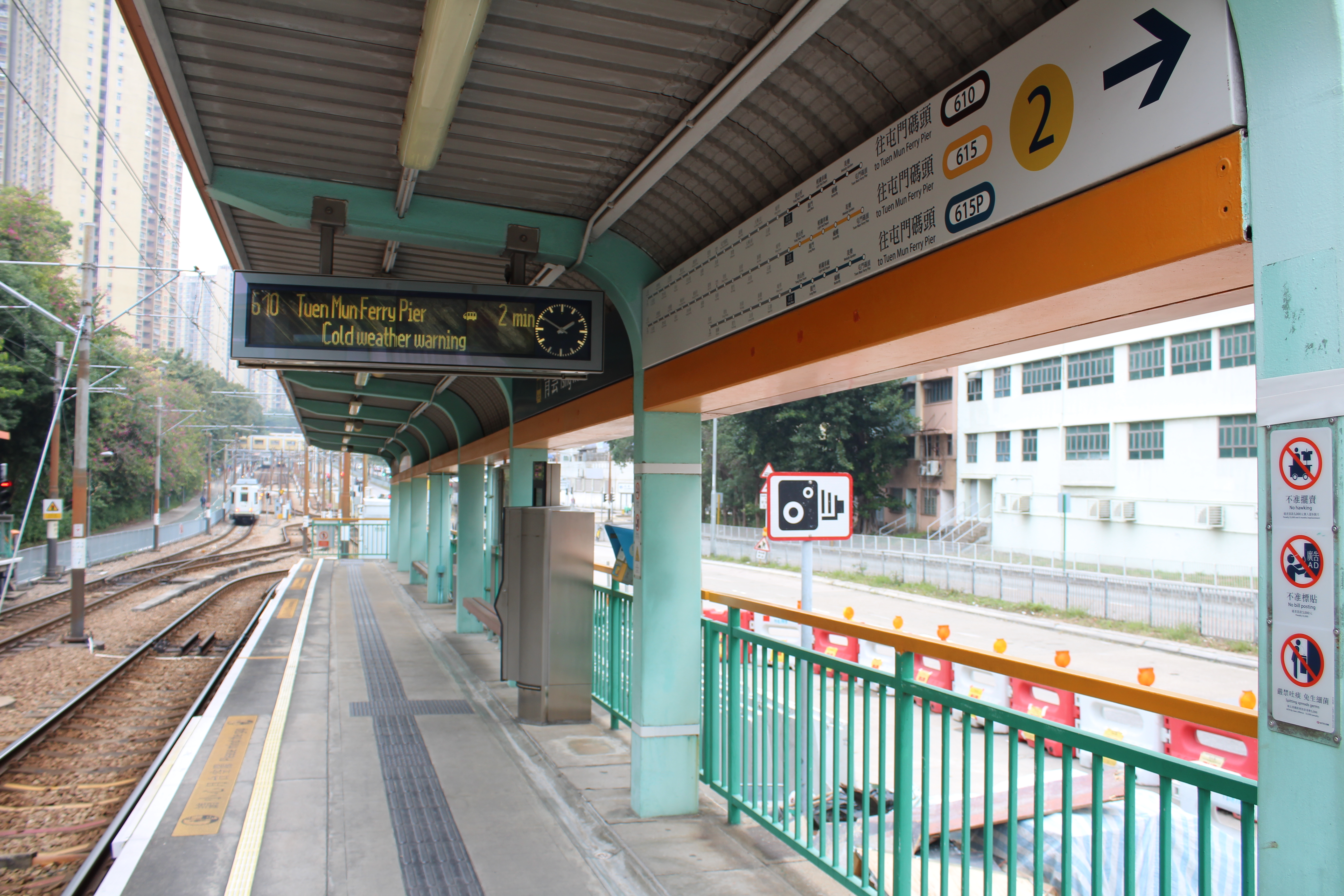 青雲站2號月台